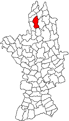 Categorie:Hărţi ale judeţului Olt